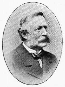 Portrait of Ernst Georg Åberg